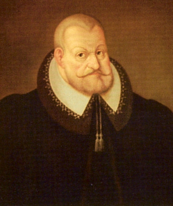 Herzog Julius zu Braunschweig-Wolfenbüttel (1528-1589), zeitgenössisches Ölgemälde